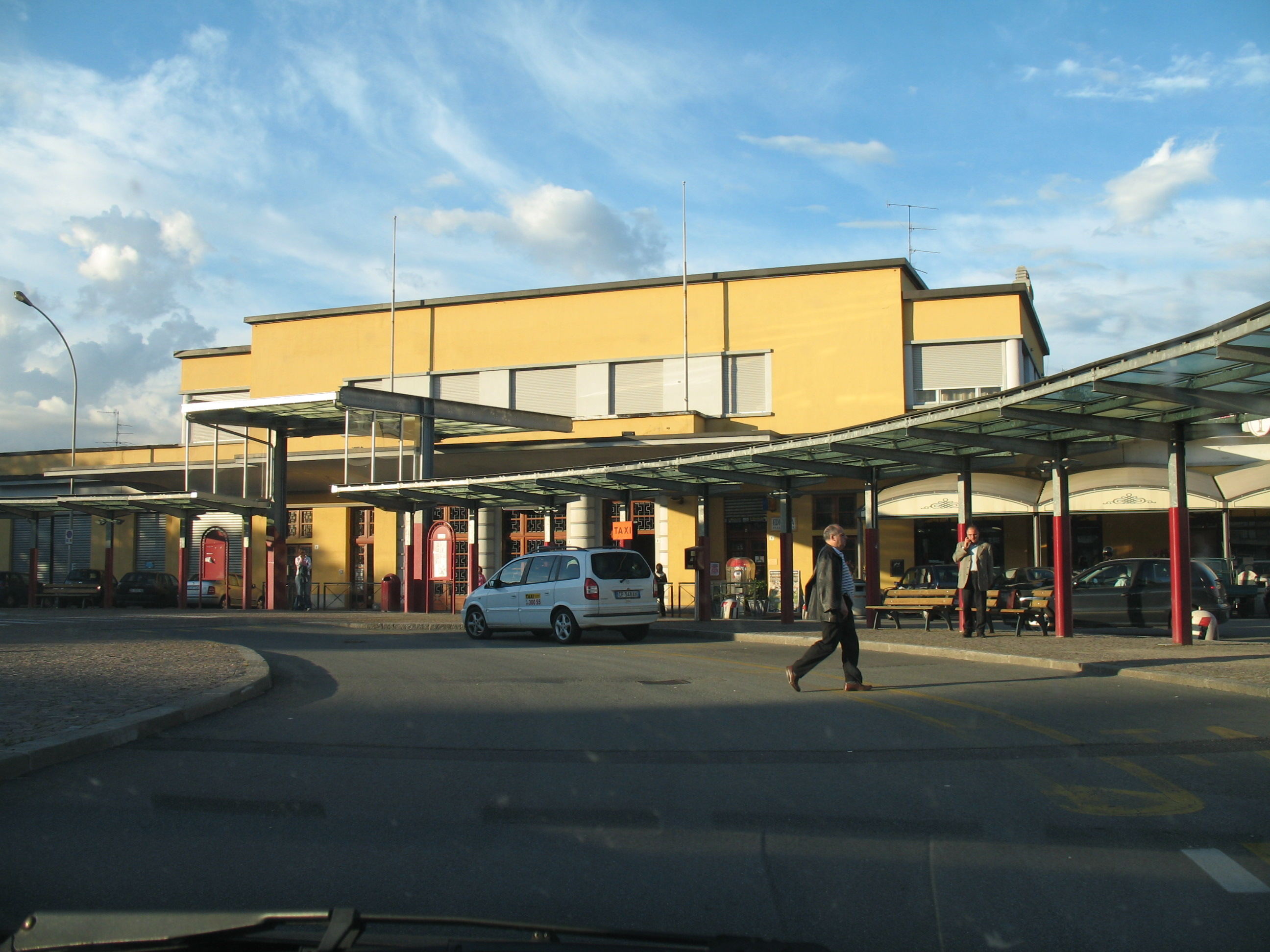 Stazione ferroviaria di Biella.